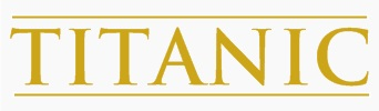 Titanic.